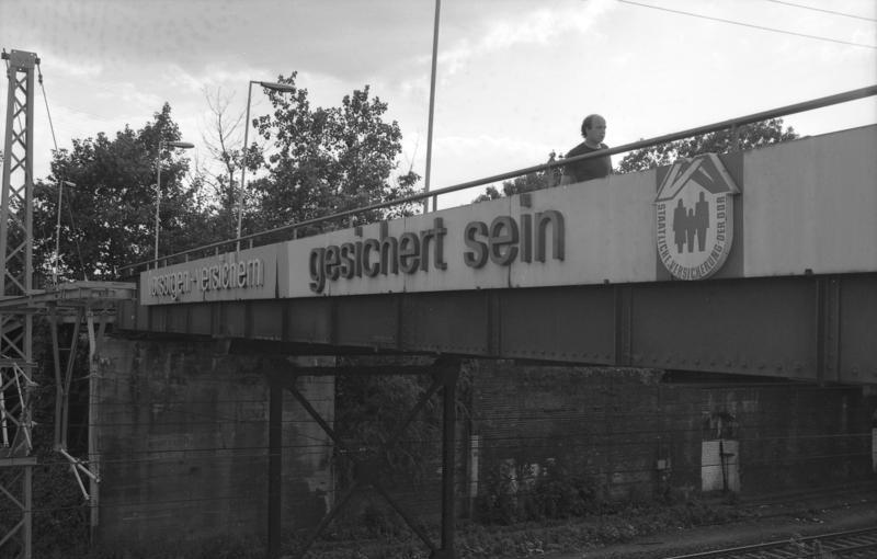 22.7.1991 Berlin-Friedrichshain, S-Bahnhof Ostkreuz